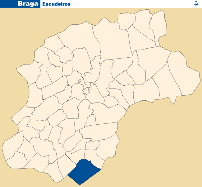 Localização de Escudeiros no concelho de Braga.